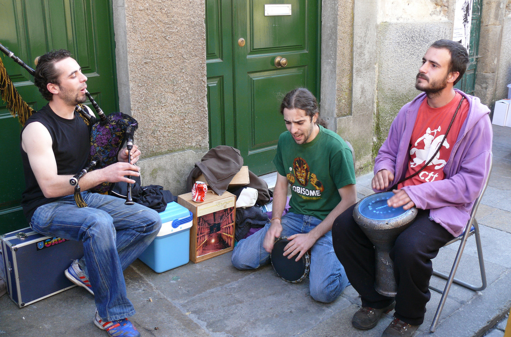 Música na rúa, Santiago de Compostela. Galiza